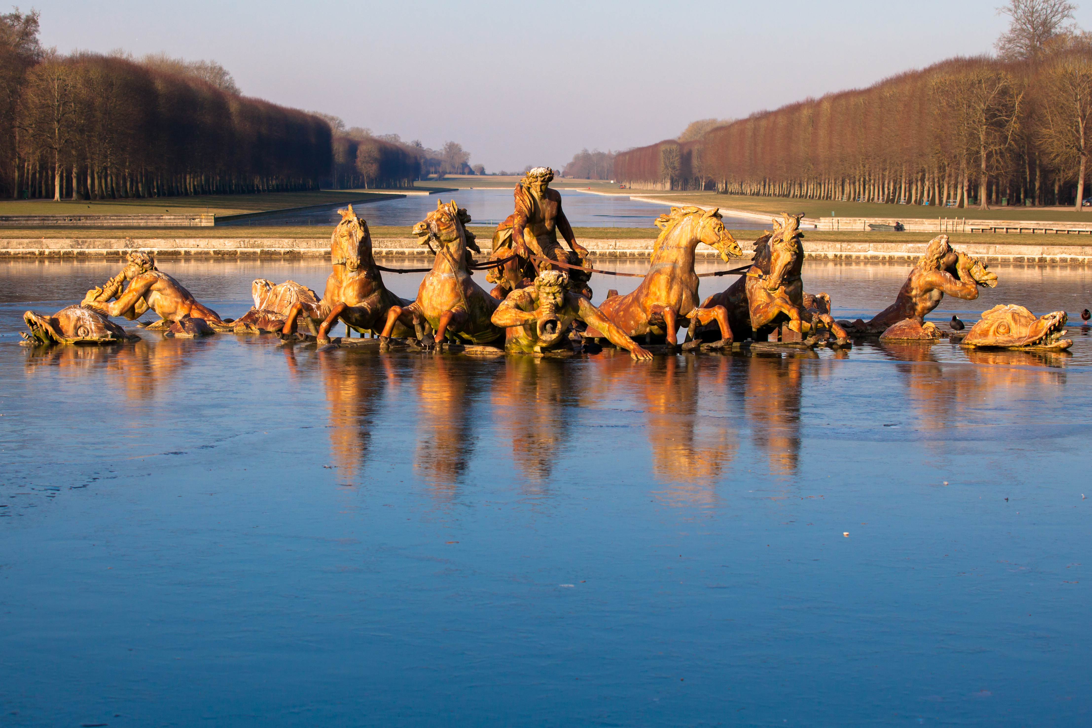 Versailles in Winter